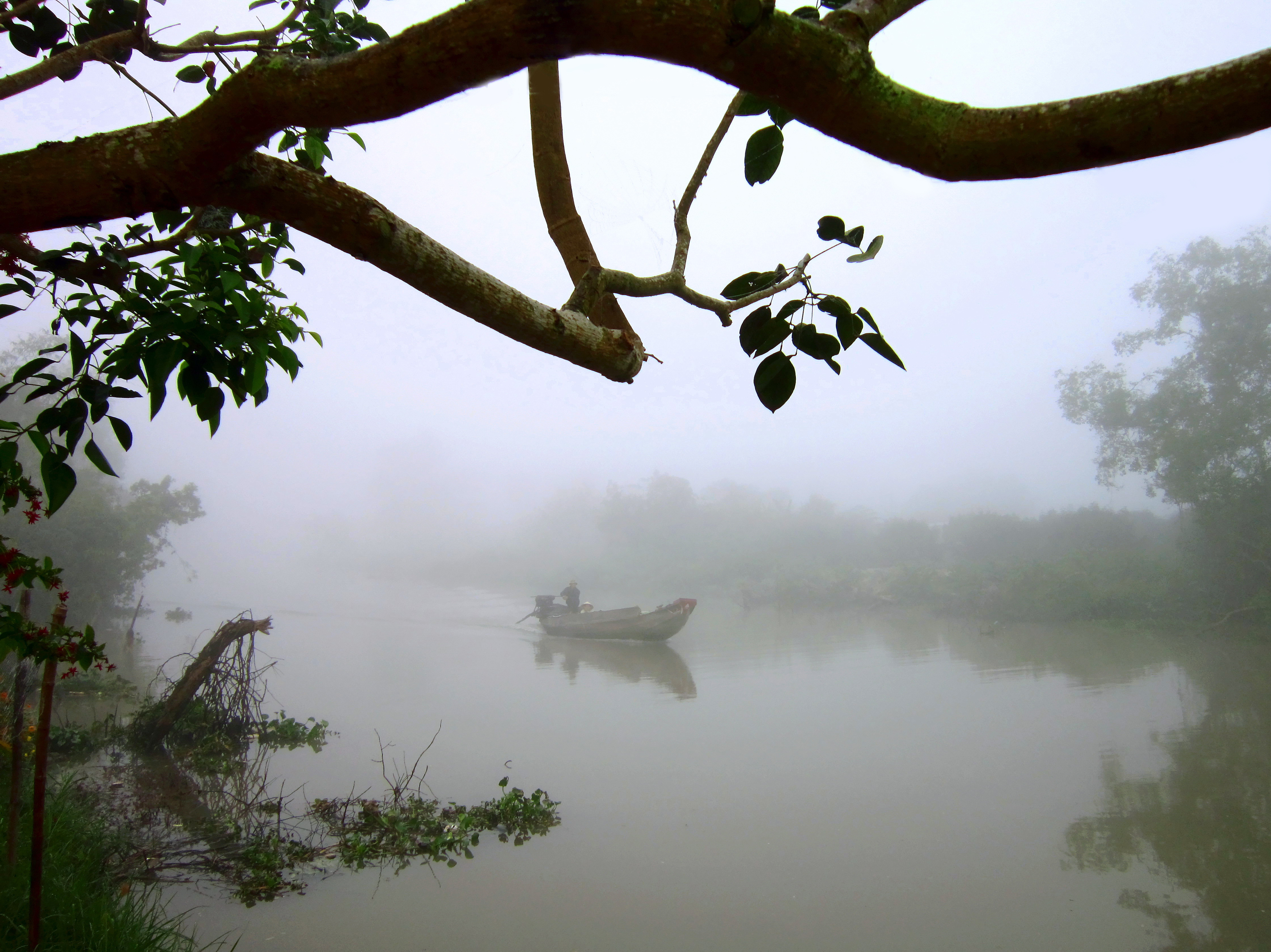 Sương mù trên rạch Cái Răng, thuộc Cần Thơ, Việt Nam.